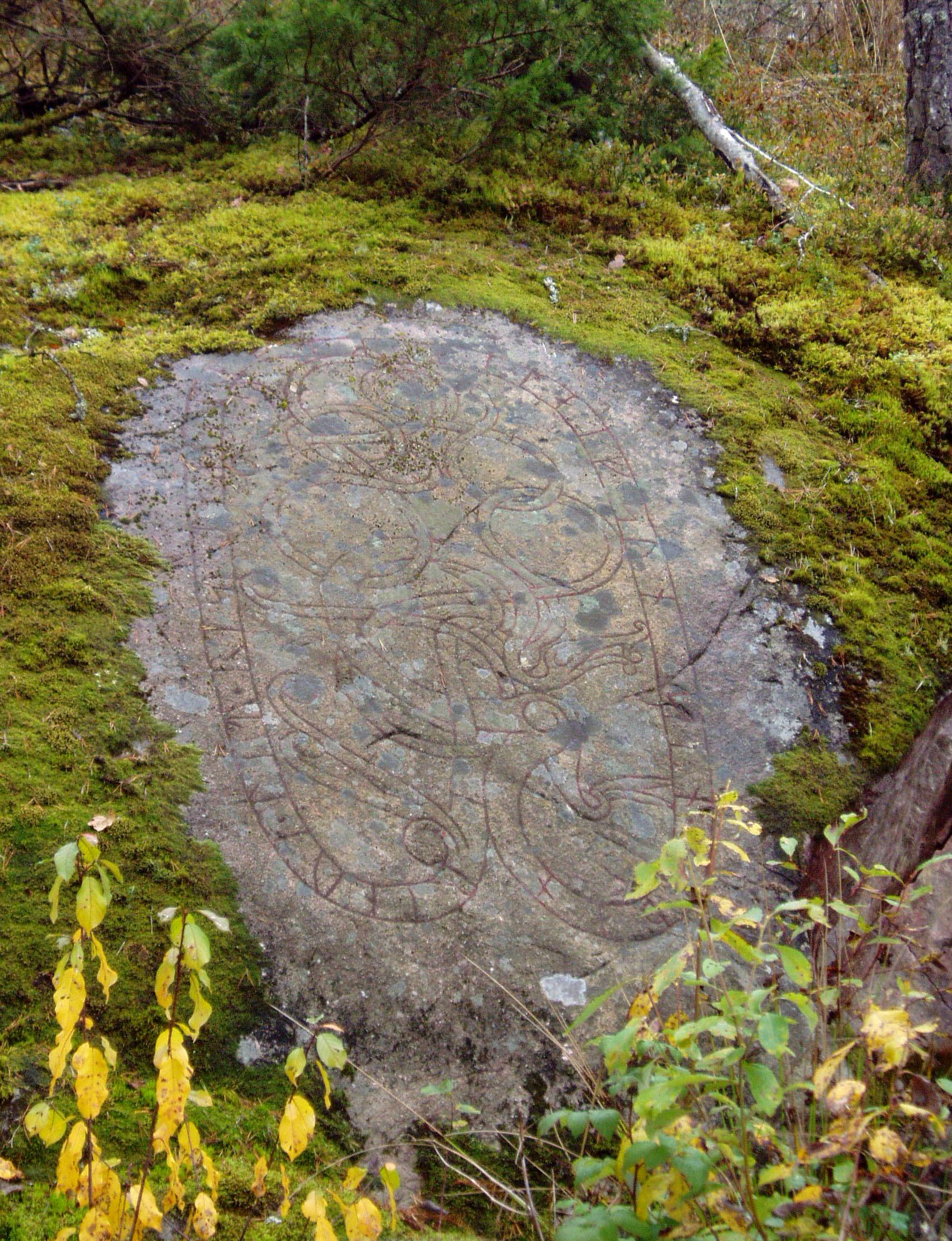 Upplands runinskrifter 265